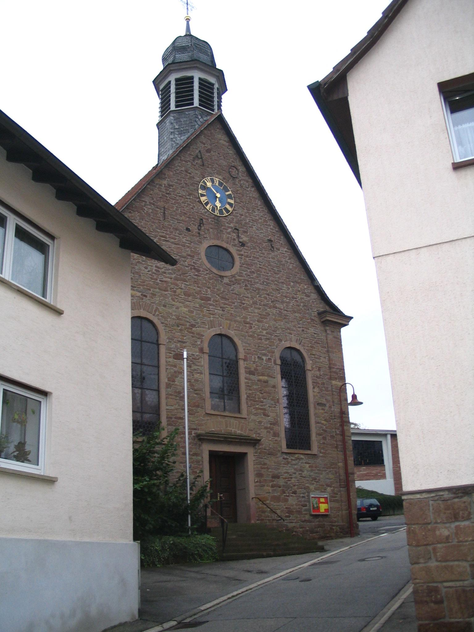 evangelische Kirche von 1823 in Tairnbach